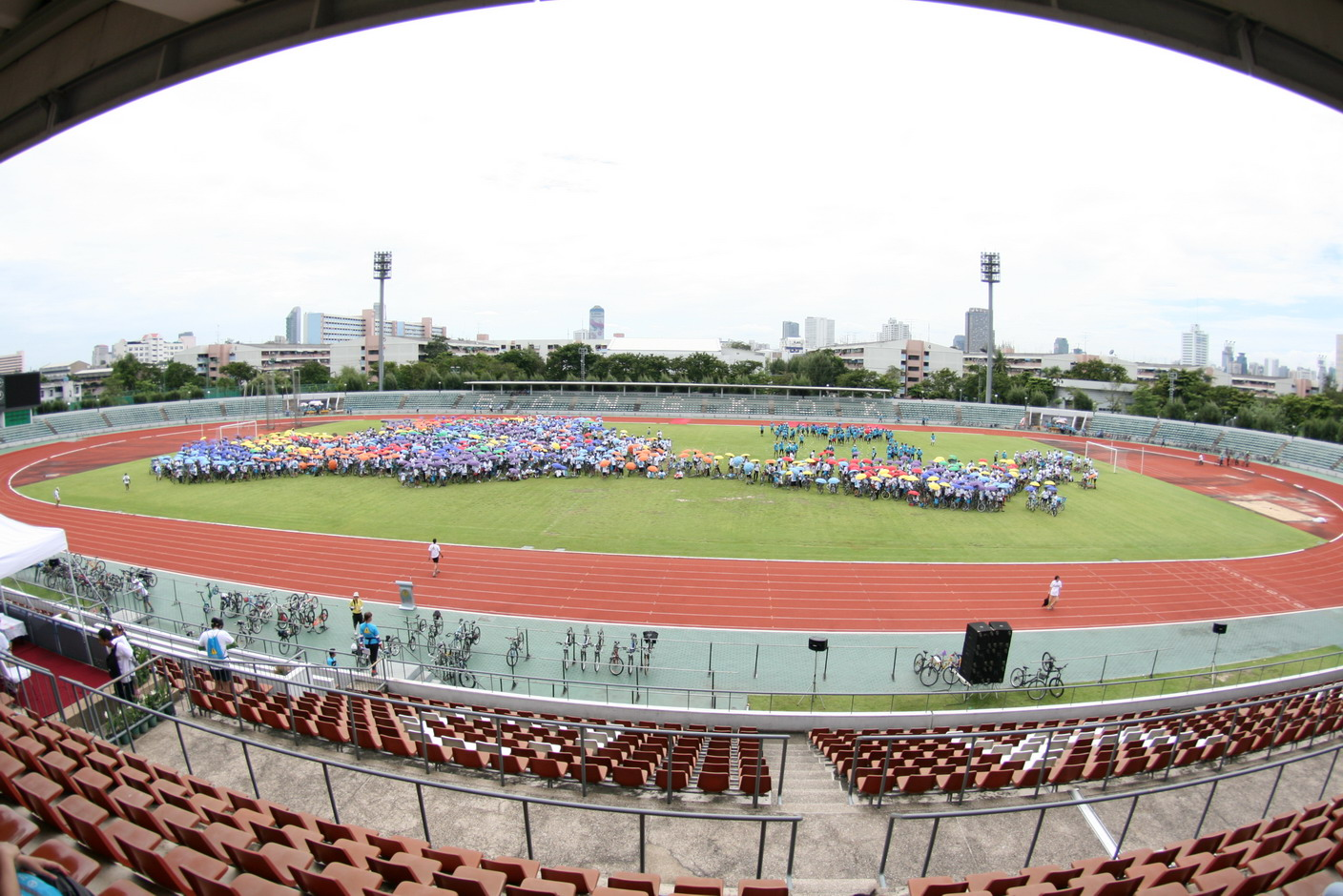 กิจกรรมงาน Bangkok Car Free Day 2008 มีการแปรขบวนจักรยานเป็นรูปแผนที่ประเทศไทย by A. Aruninta